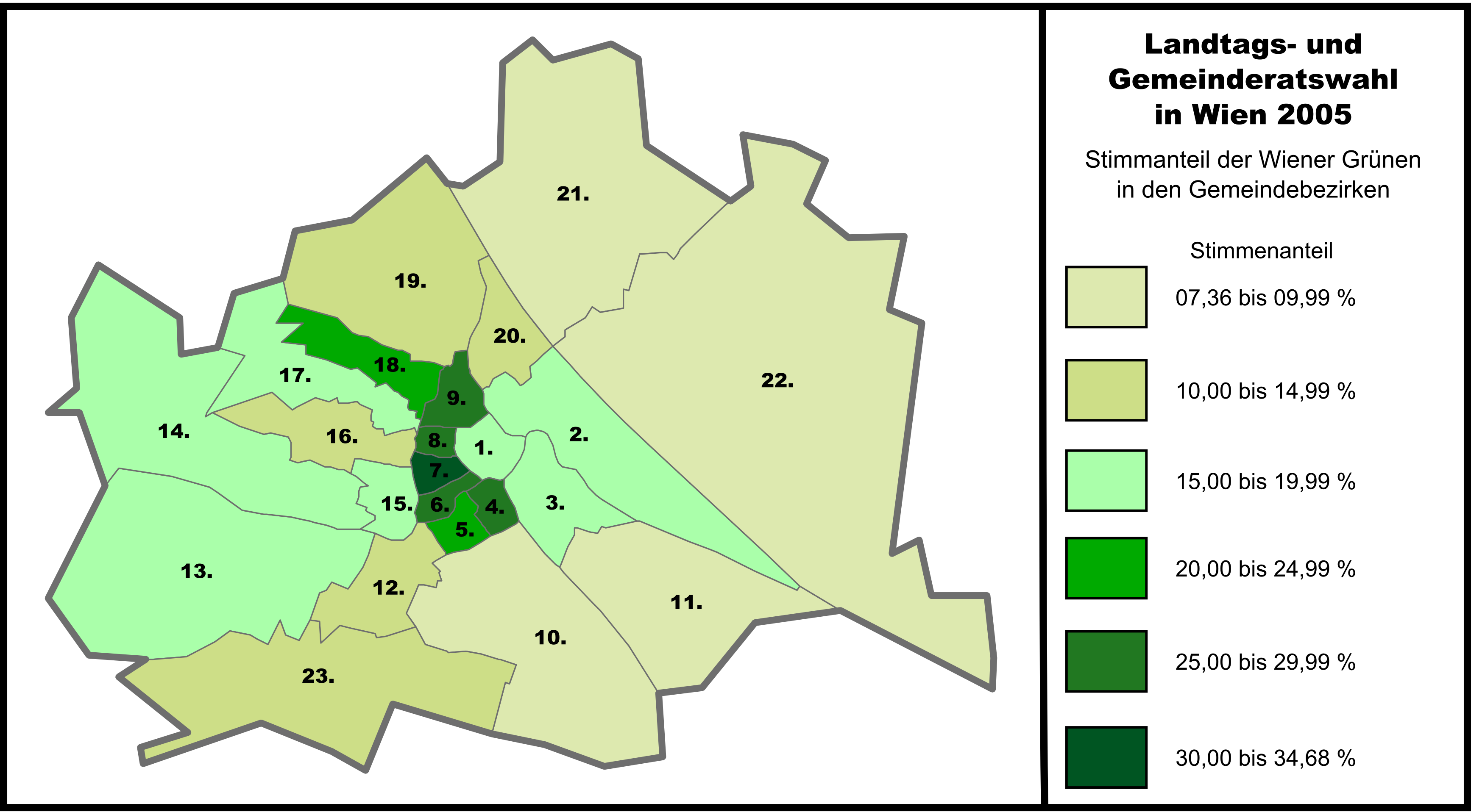 Stimmanteil der Wiener Grünen bei der Landtagswahl 2005